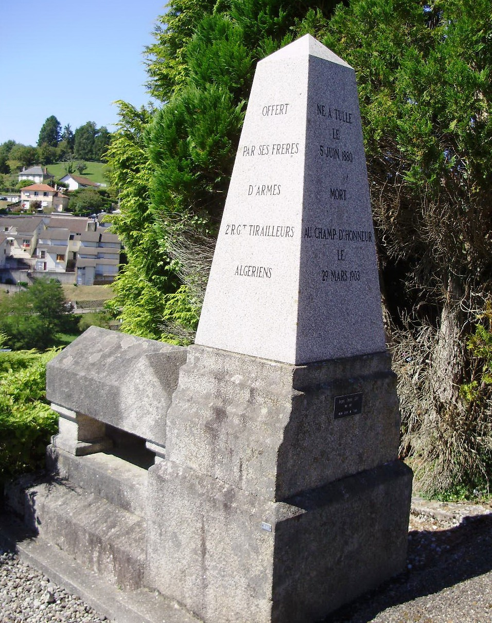 Il s'agit du tombeau du sergent fourrier Charles Lovy qui se trouve à Tulle (Corrèze), au cimetière du Puy-Saint-Clair.